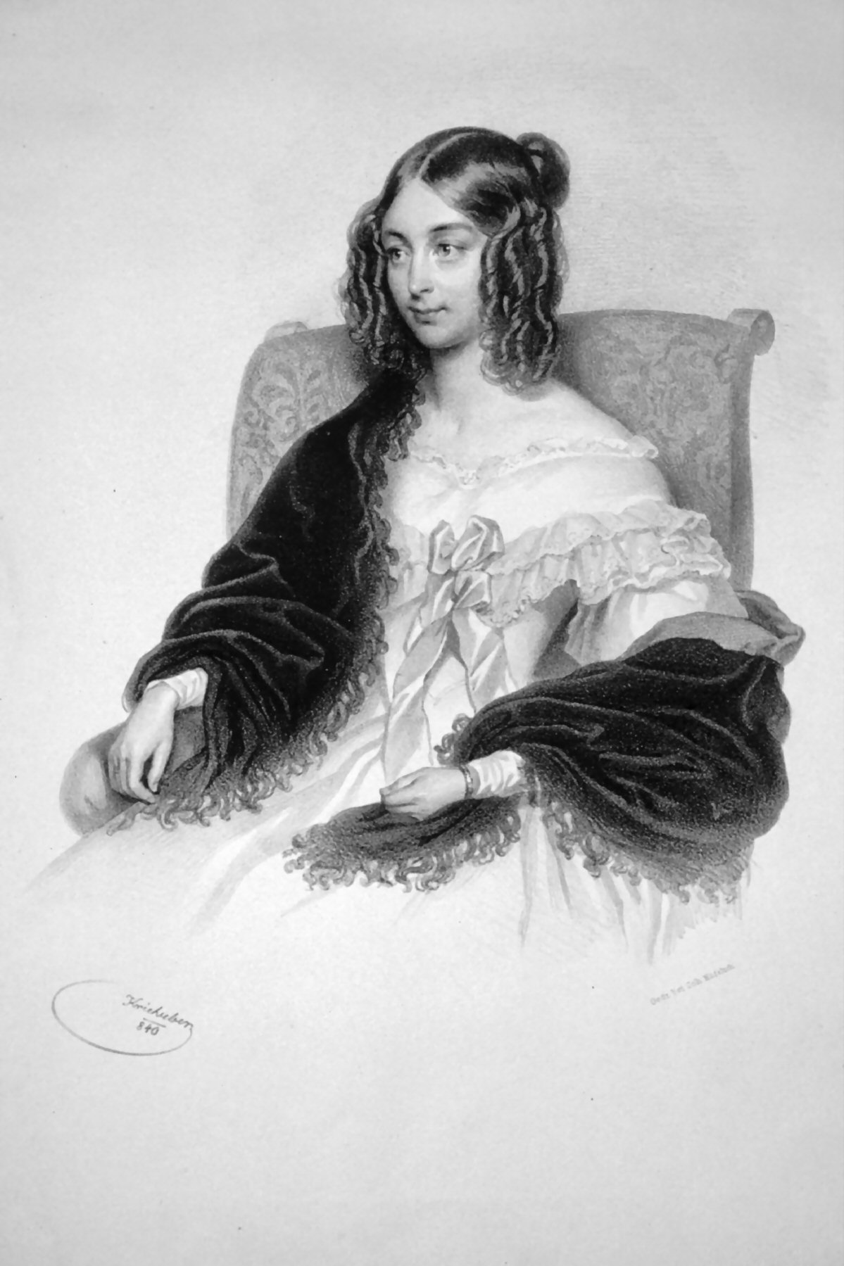 Guidobaldine Gräfin Kuefstein (1807-1874), geb. Paar. Lithographie von Josef Kriehuber, 1840